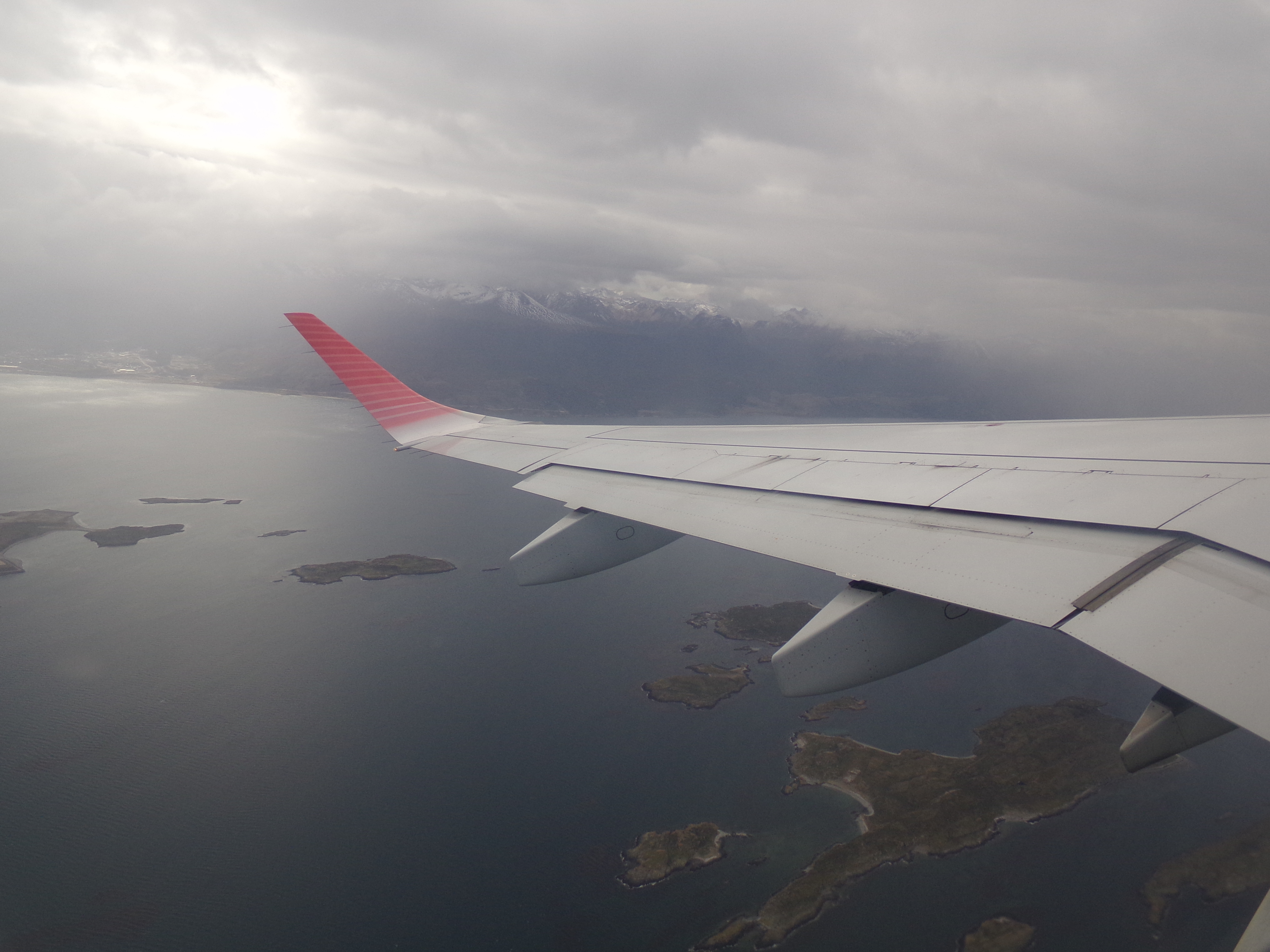 Vista área desde un Embraer 190 despegando